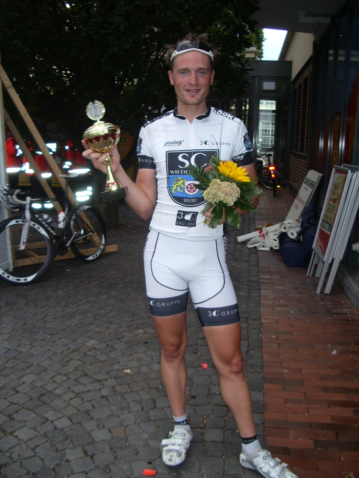 Paderborn: Hendrik Werner vom Elite-Team des SC Wiedenbrück 2000 als Sieger des 9. Internationalen Paderborn überzeugt Radrennens 2009, veranstaltet durch die Radsportgemeinschaft Paderborn 99 e. V. innerhalb der Paderborner Radrenntrilogie 2009